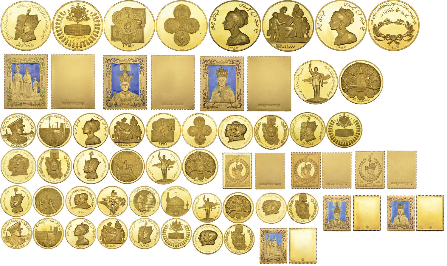 برخی مدال های طلای دوران محمدرضا پهلوی که به مناسبت های مختلف ضرب شده اند.